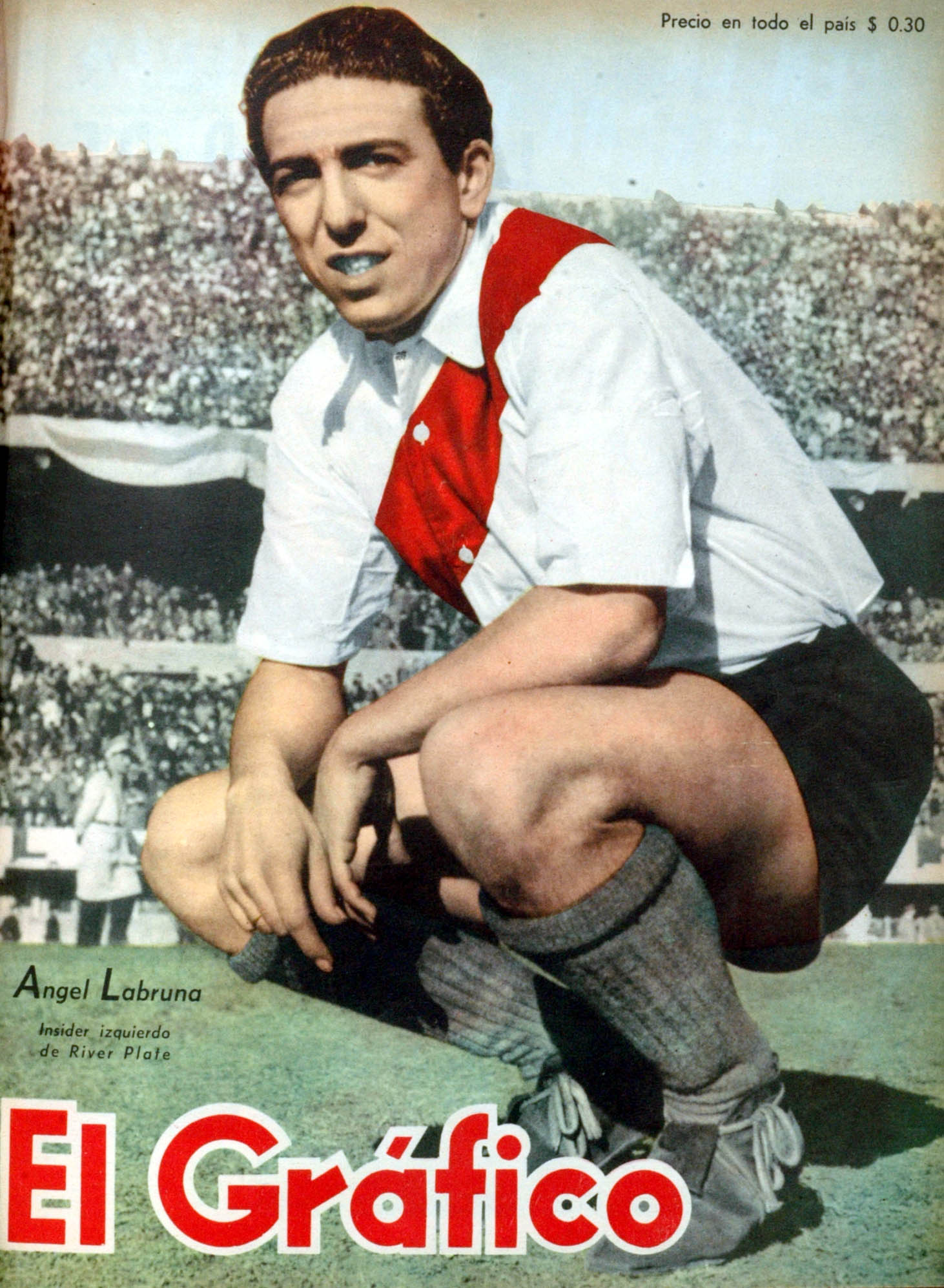 El Grafico del 10 de Octubre de 1947. Edicion 1474